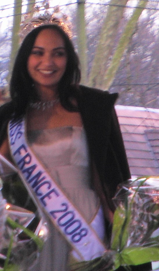 Valérie Bègue, née le 26 septembre 1985 à Saint-Pierre, a été élue Miss France 2008, avec l'écharpe de Miss Réunion le samedi 8 décembre 2007 au terme d'une soirée diffusée sur TF1 en direct de Dunkerque. Prise de vue le 13 janvier 2010 à l'hippodrome de Pau.